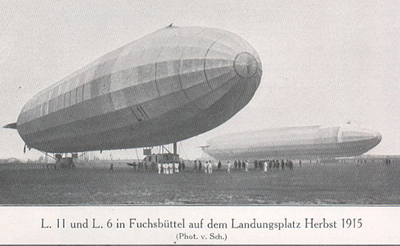 L.11 und L.6 in Fuhlsbüttel auf den Landungsplatz Herbst 1915